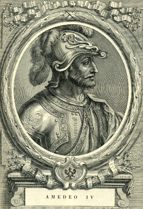 Amedeo IV di Savoia (1197 - 1253)